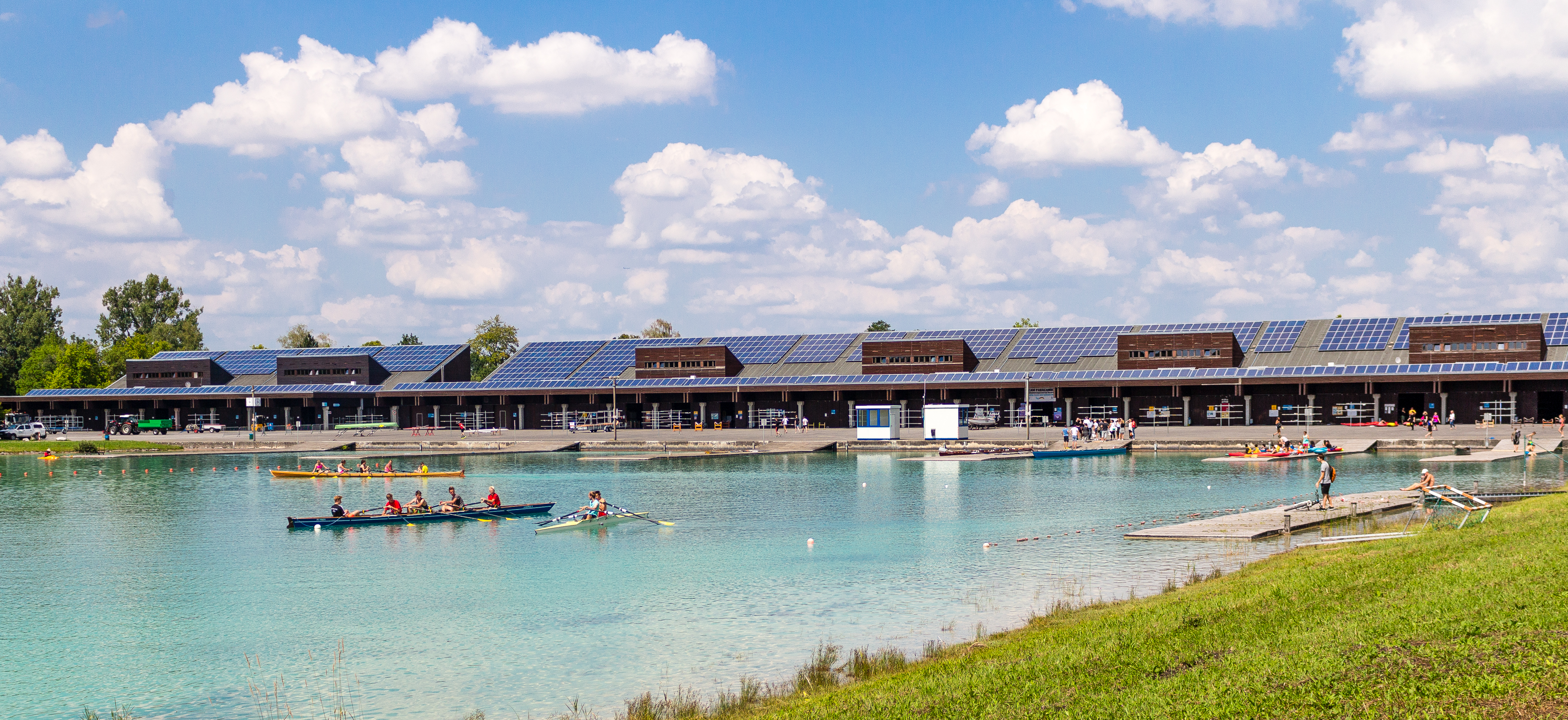 Regattastrecke Oberschleißheim Ziel